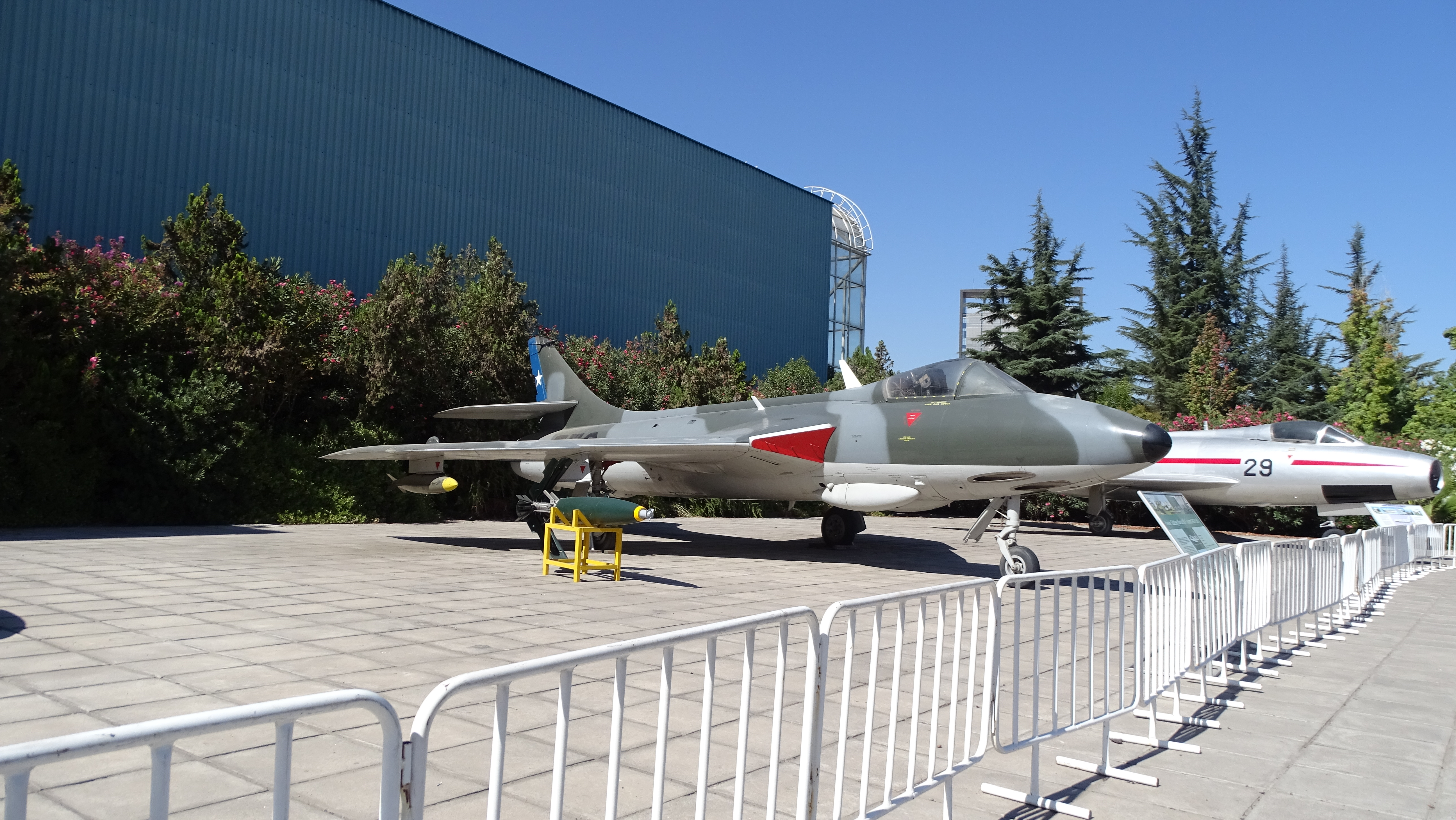 Imágen de un Hawker Hunter perteneciente a la Fuerza Aérea de Chile en dependencias del Museo Aeronáutico y del Espacio de Santiago de Chile.